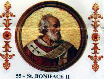 Pope Boniface II